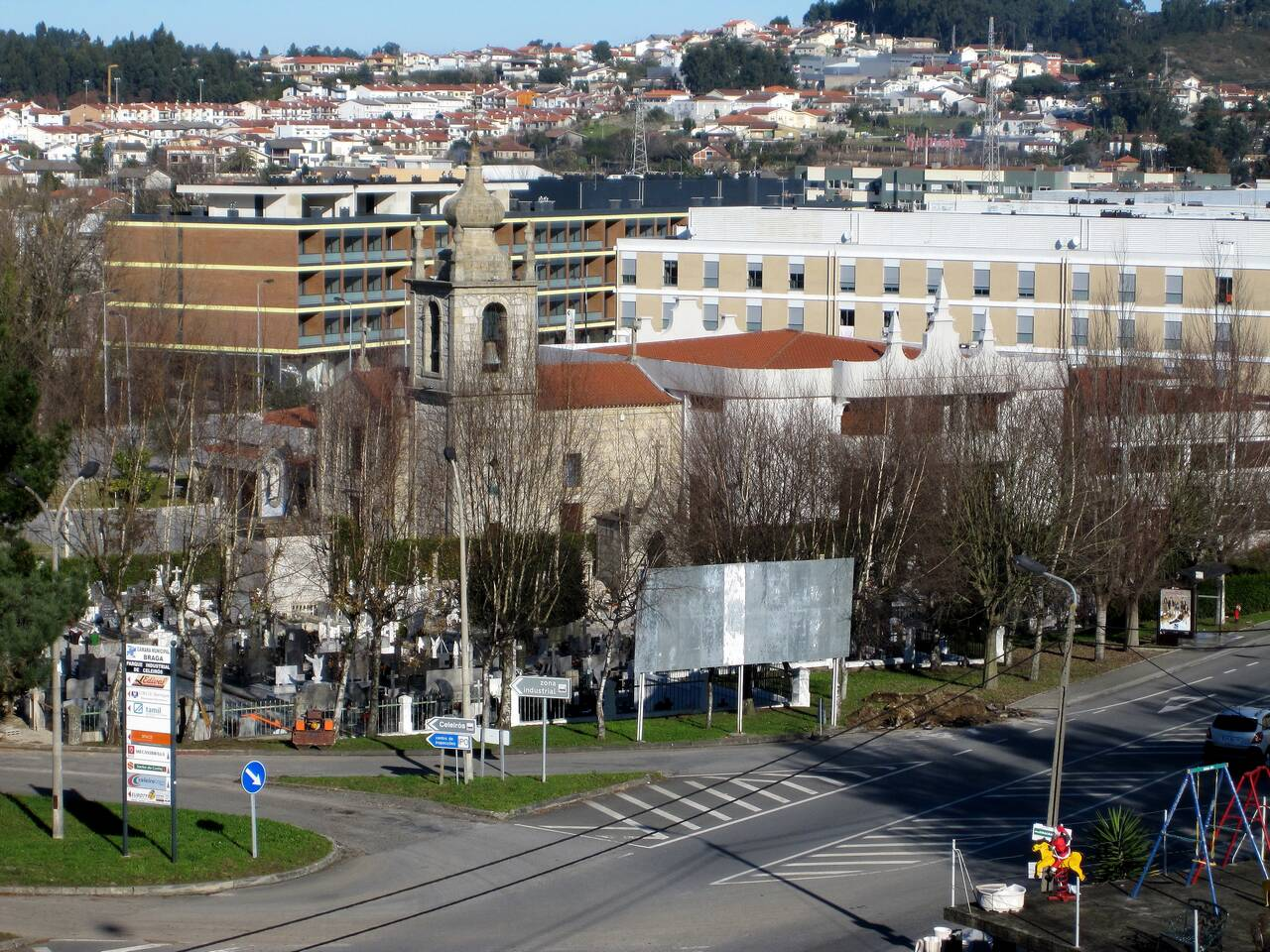 Celeirós-Braga